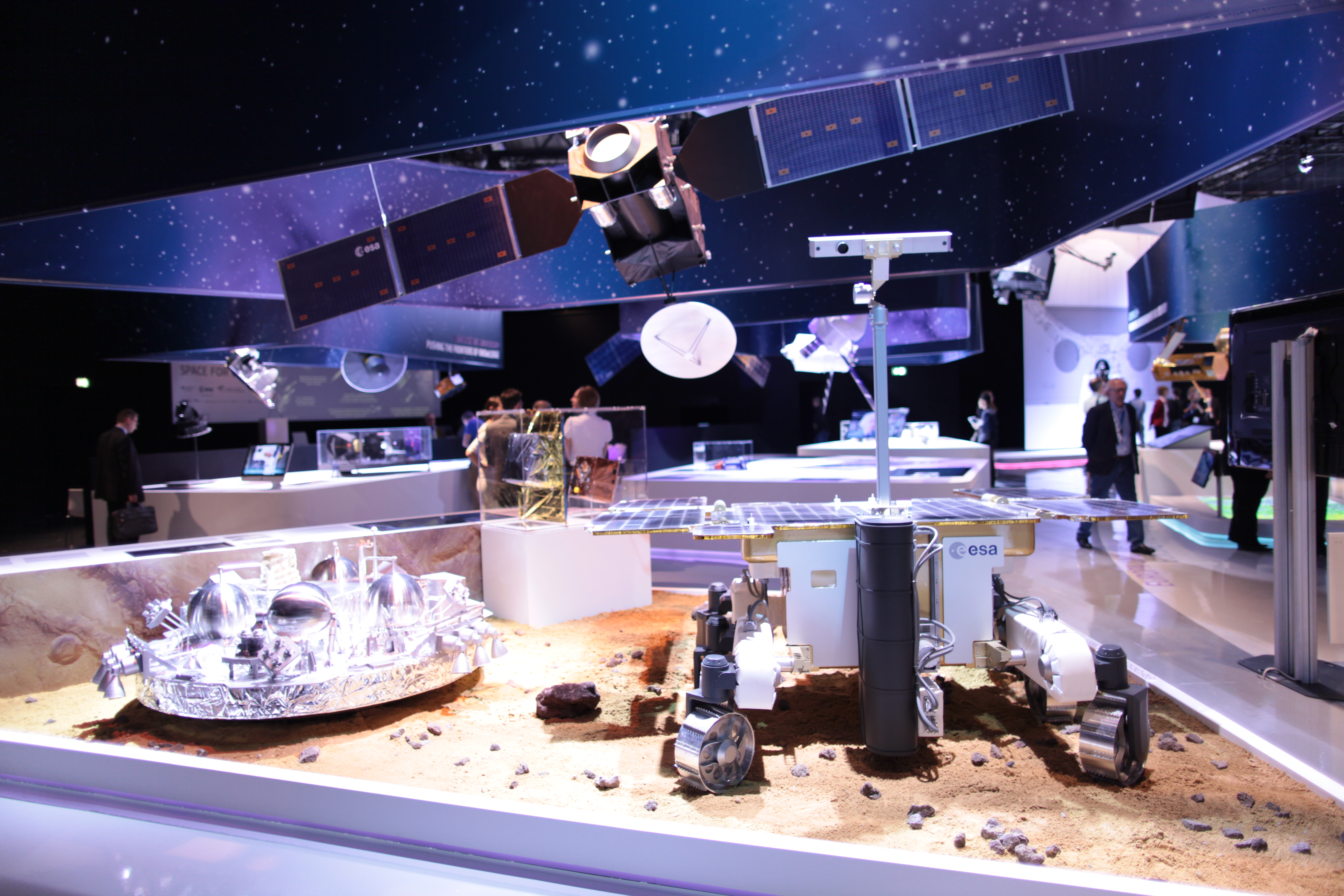 ExoMars